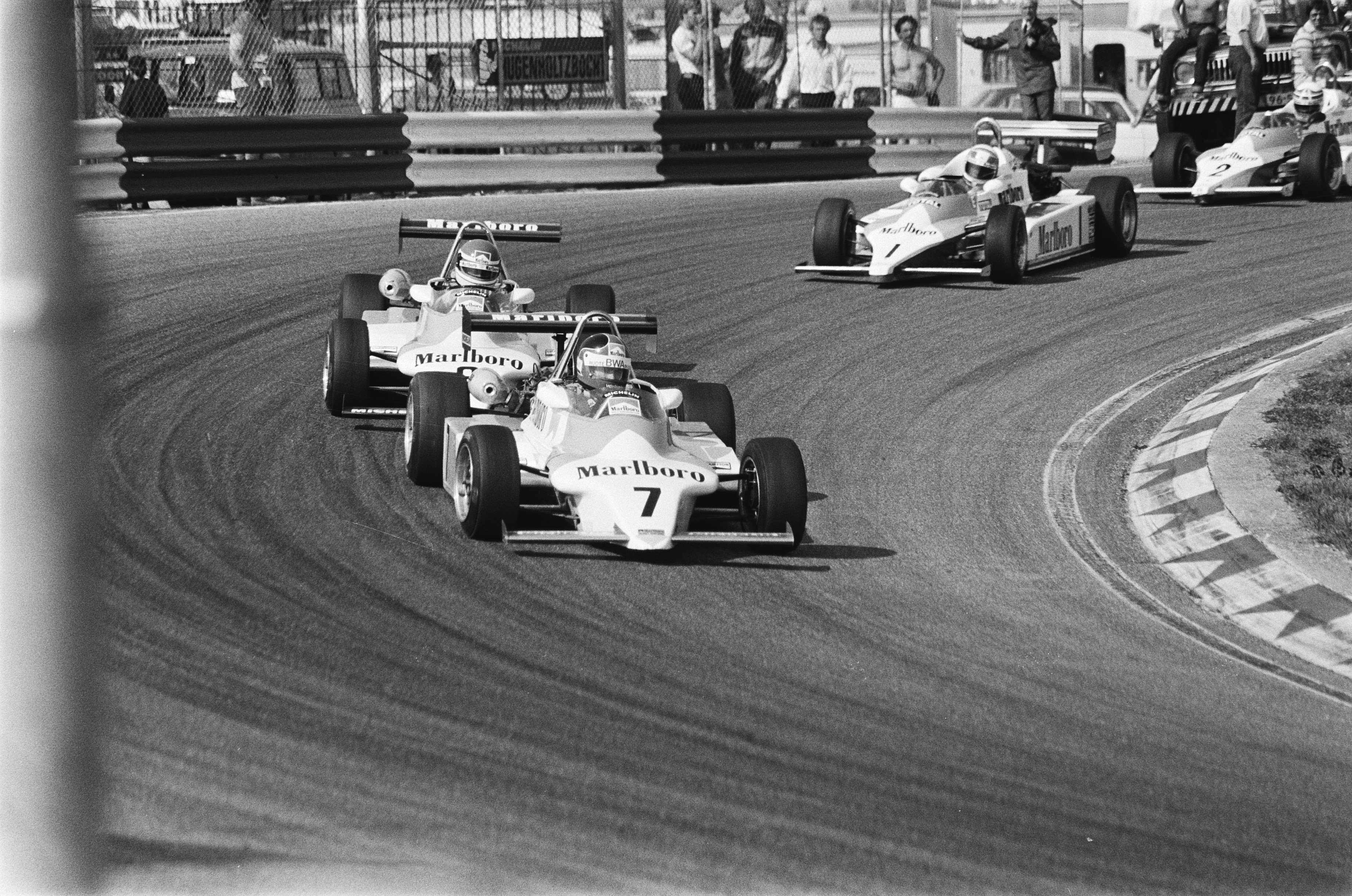 Collectie / Archief : Fotocollectie Anefo Reportage / Serie : [ onbekend ] Beschrijving : Pinksterraces op circuit van Zandvoort; formule 3 (meetellend voor EK); Larraur (nr. 7, winnaar), Ferte (nr. 1), Pirro (nr. 6), Allid (nr. 2) en Giangrassi / Datum : 31 mei 1982 Locatie : Noord-Holland, Zandvoort Trefwoorden : autoraces Fotograaf : Antonisse, Marcel / Anefo Auteursrechthebbende : Nationaal Archief Materiaalsoort : Negatief (zwart/wit) Nummer archiefinventaris : bekijk toegang 2.24.01.05 Bestanddeelnummer : 932-1900